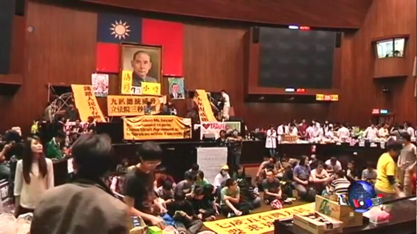 中文（台灣）: 被佔領的議場情況。